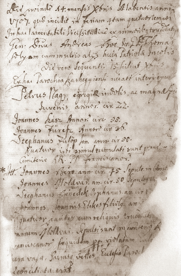 Szárhegyi Bíró János halotti bejegyzése 1707-ből